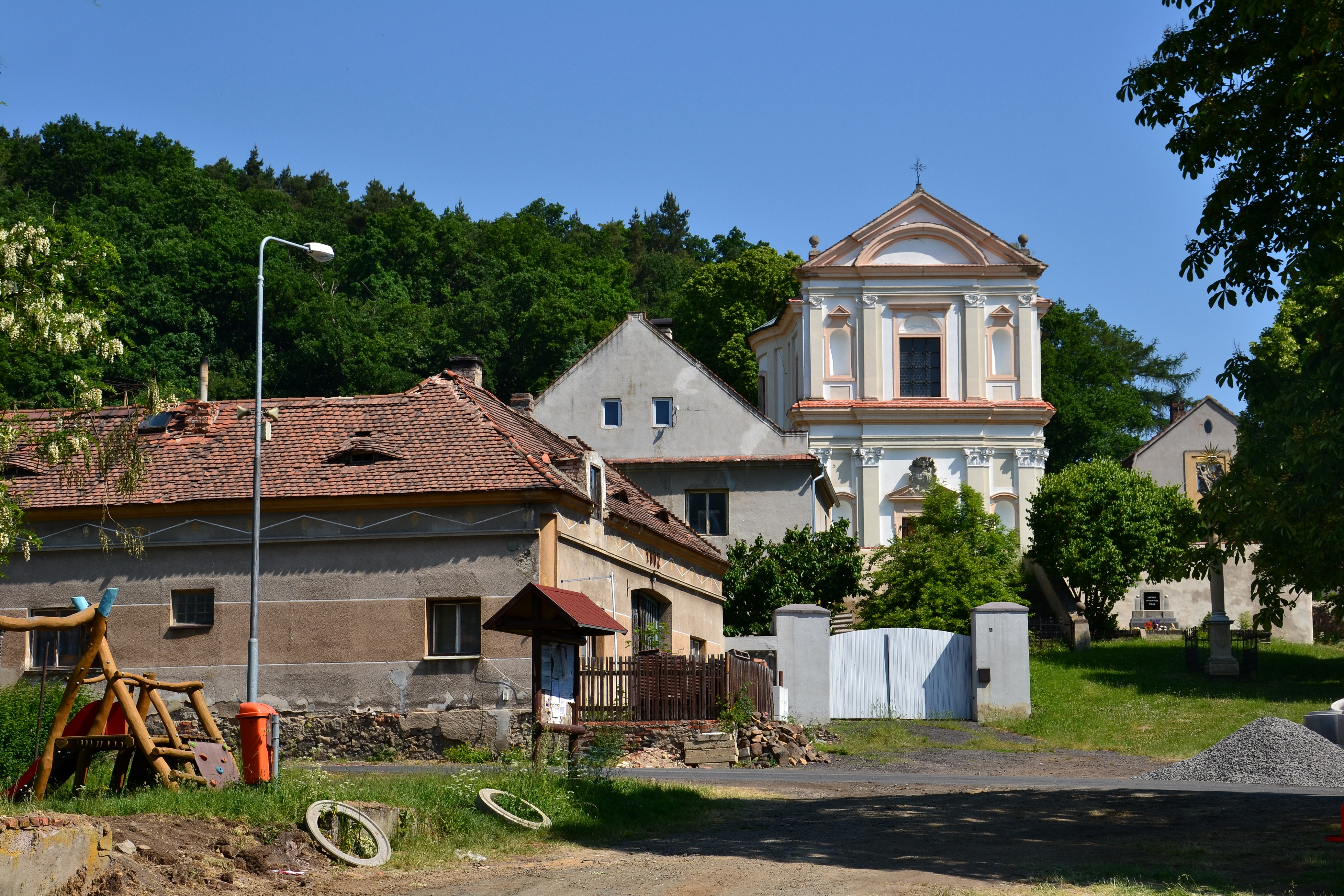 Střed vesnice s kostelem svatého Vavřince